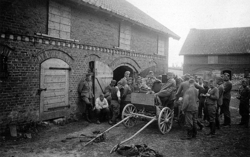 Alte Bilder meines Großvaters Der Führer spricht, Angriff aus Russland